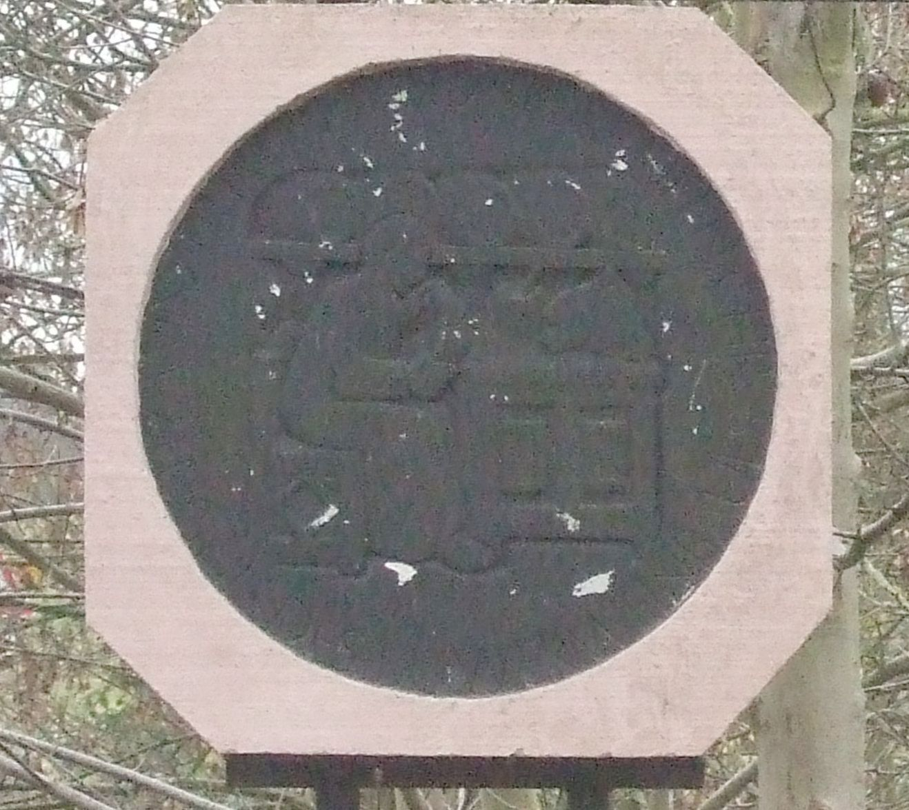 Winzer im Weinkontor, Mertesdorf